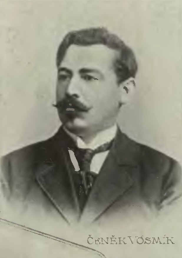 Portrét – Čeněk Vosmík (1860 - 1944), Český sochař.